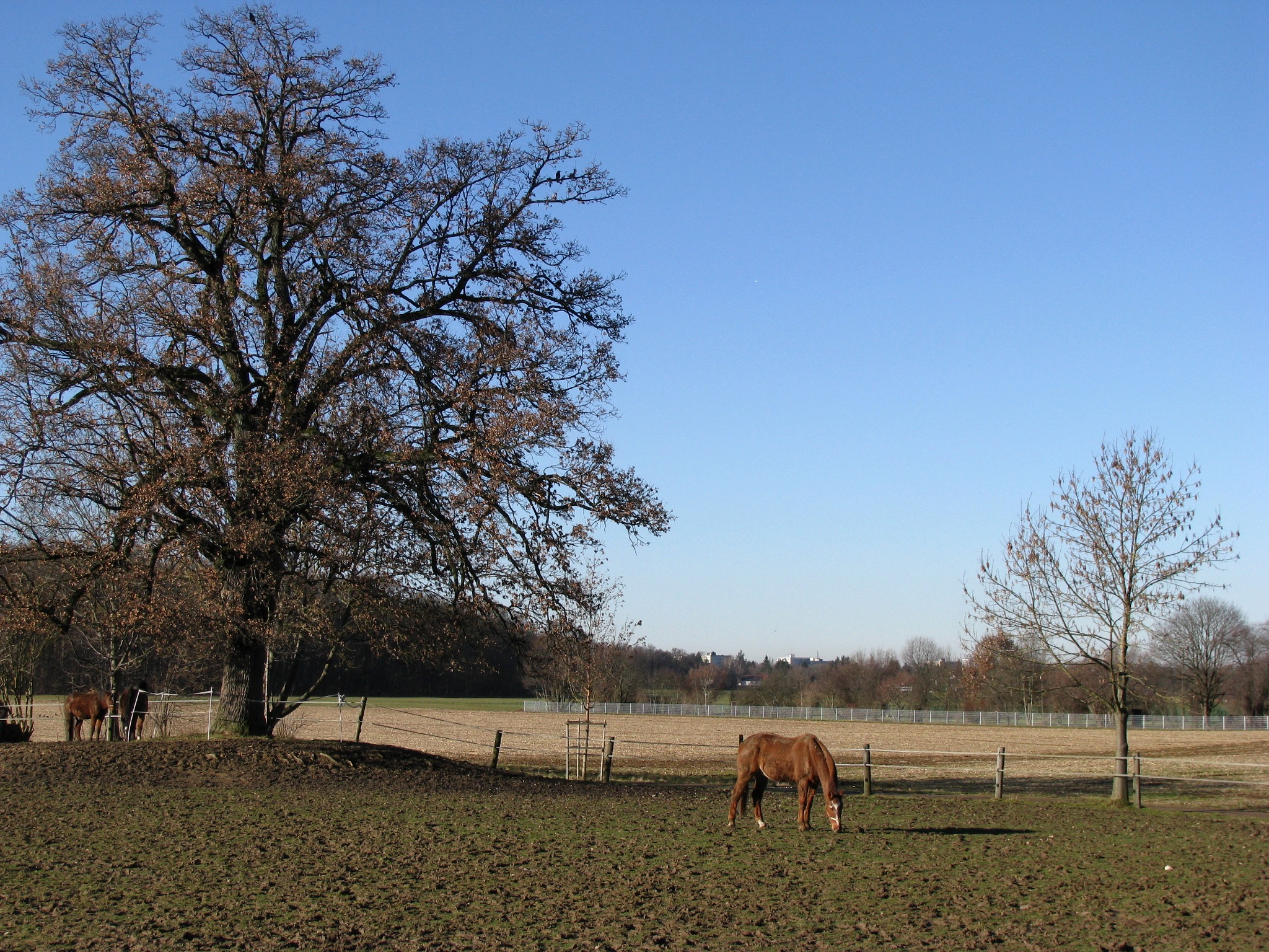 Blick von Warnberg Richtung Forstenried